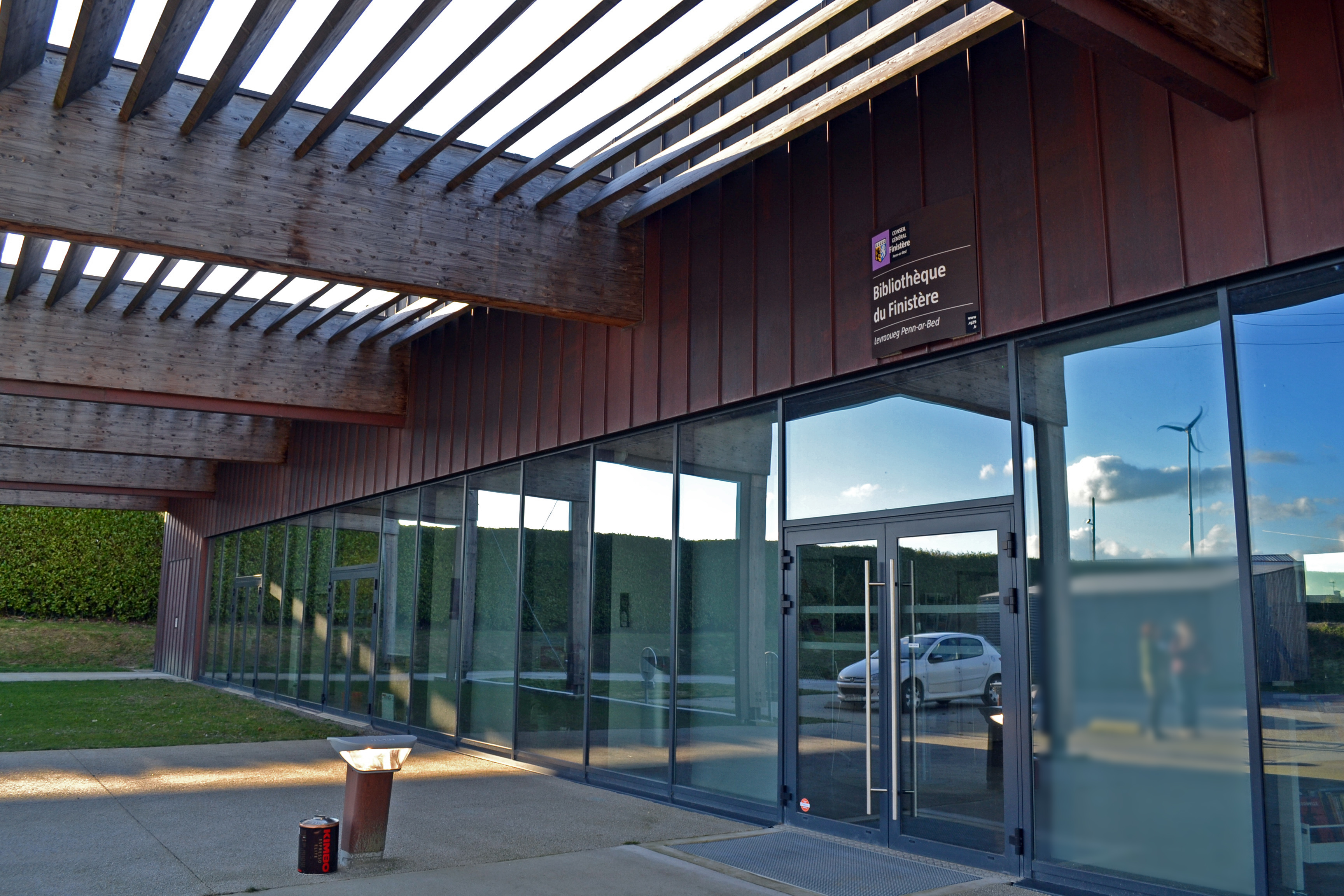 Antenne de la Bibliothèque du Finistère pour le pays de Morlaix à Sainte-Sève ouverte en 2014.